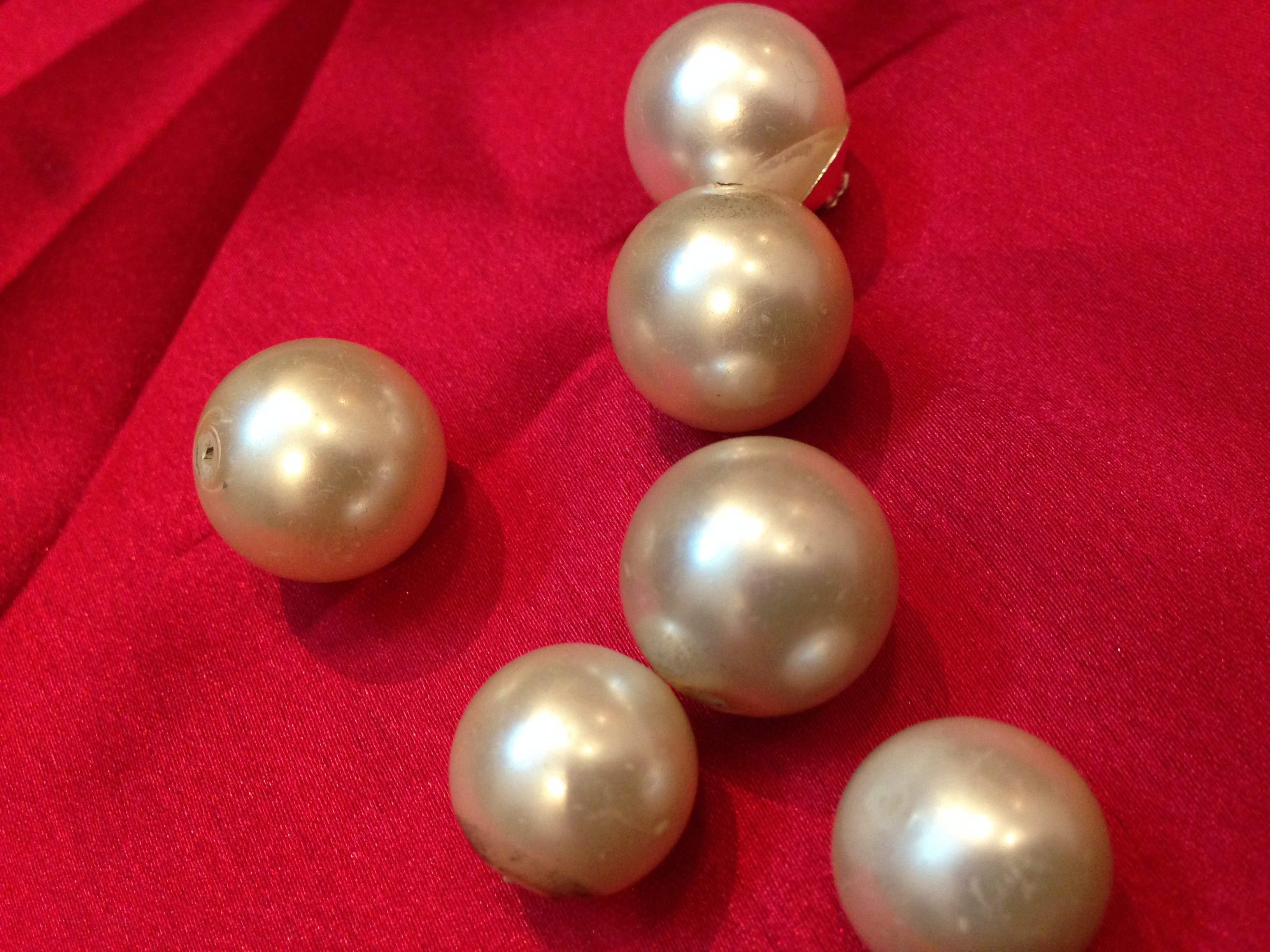 ಕನ್ನಡ: pearls